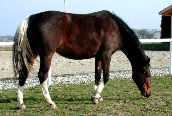 Unsere Wielkopolski-Stute Lady Su, sie steht auf der TWA Ranch ( Fotograf: Michael A. Naujoks Quelle: selbst fotografiert Datum: 31.03.2002